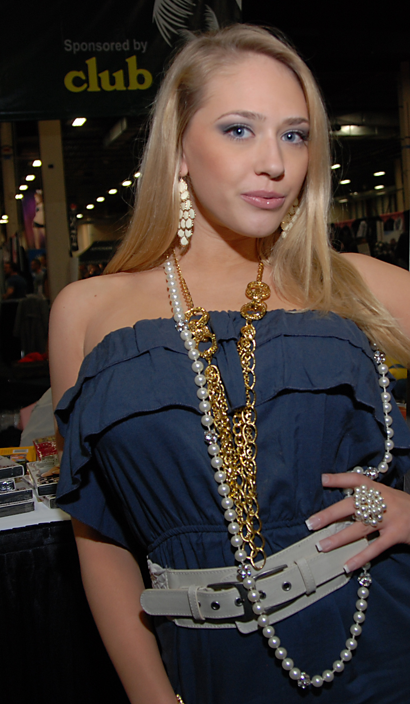 DSC_1826A